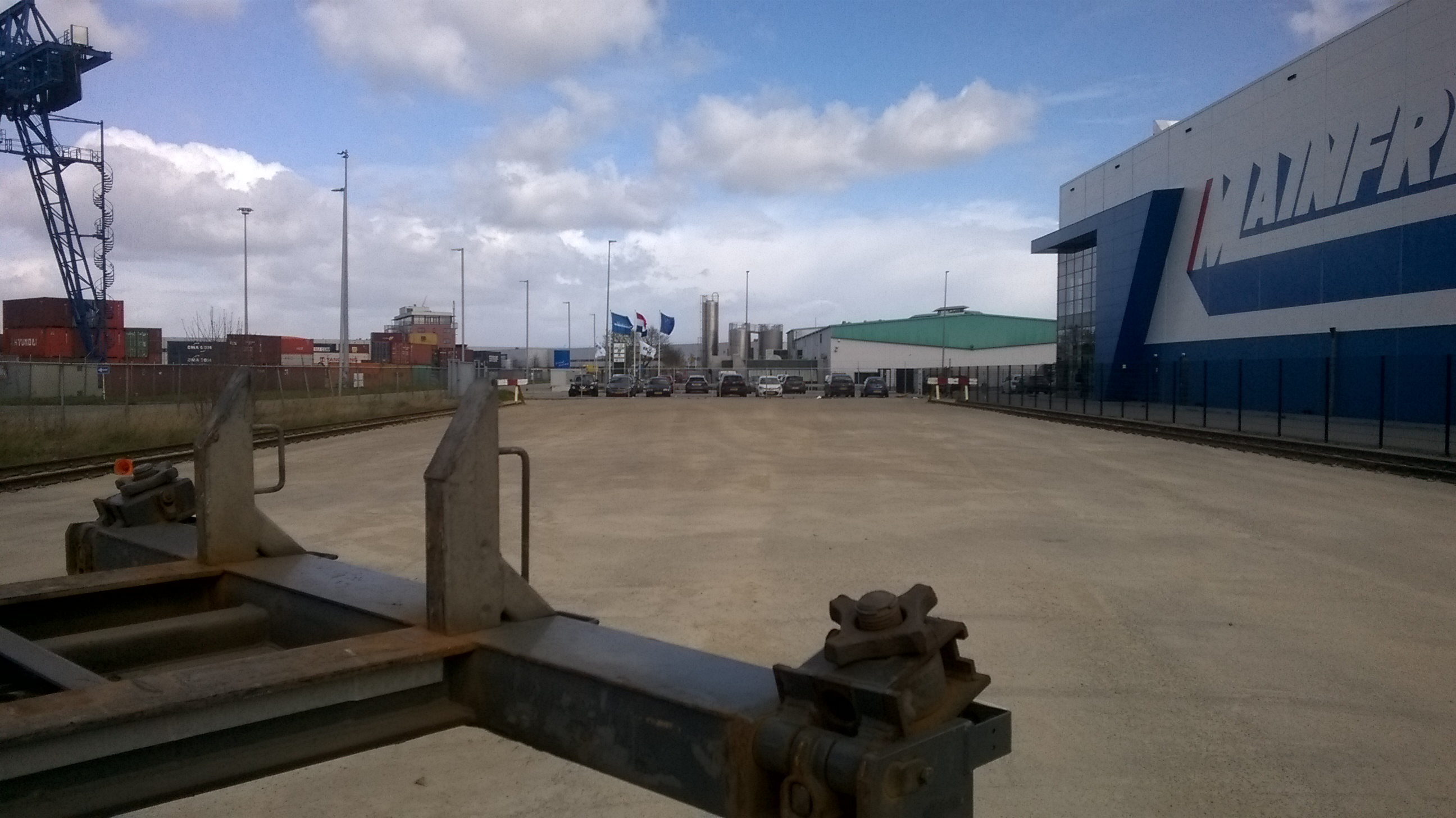 De twee sporen van de spoorlijn Sittard - Born eindigen op het industrieterrein Holtum-Noord bij twee stootblokken. Foto genomen in noordnoordoostelijke richting